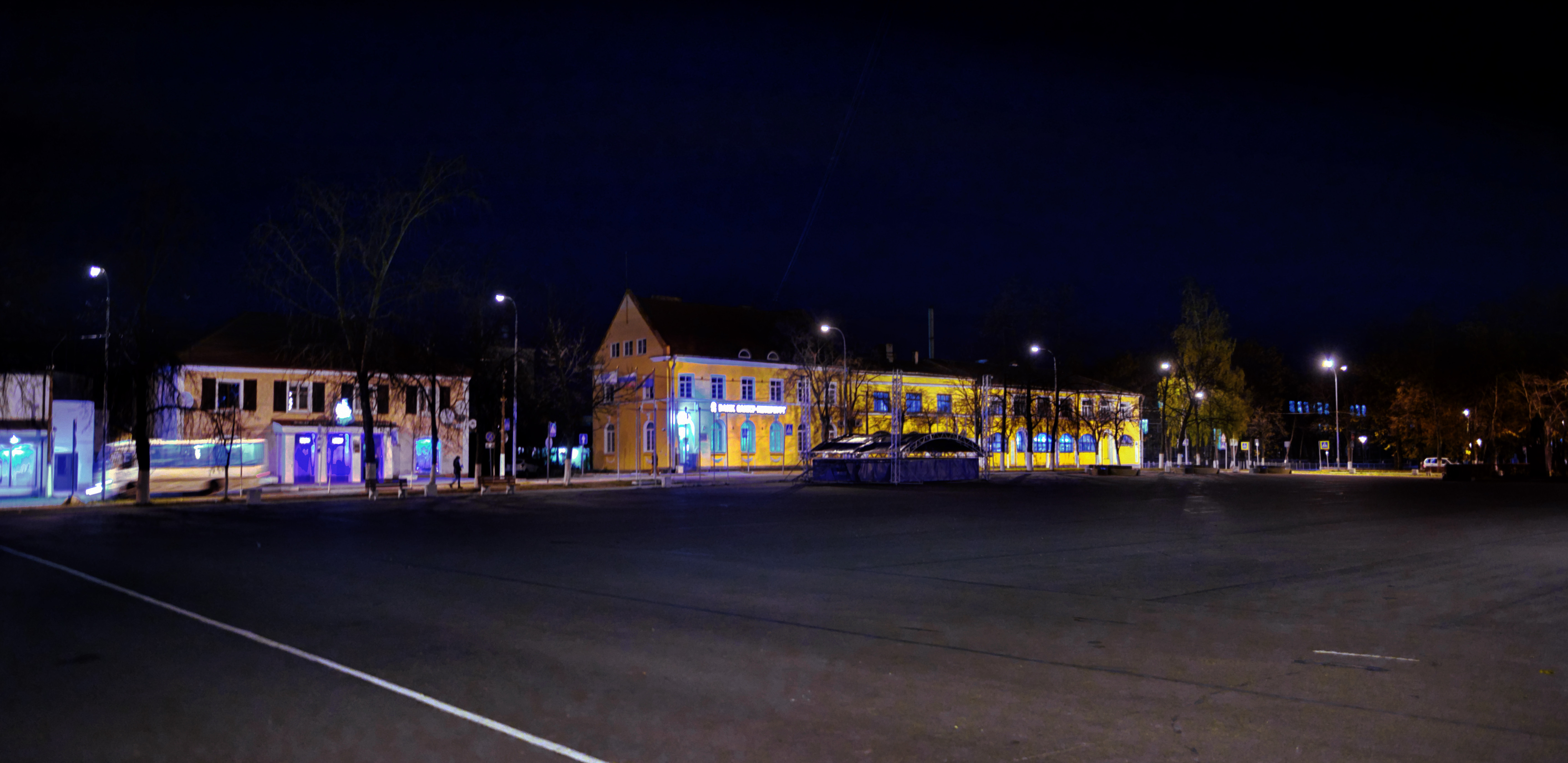 Käkisalmen tori 23.10.2016